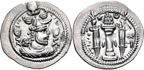 Dracma de Peroz cunhado na Carmânia